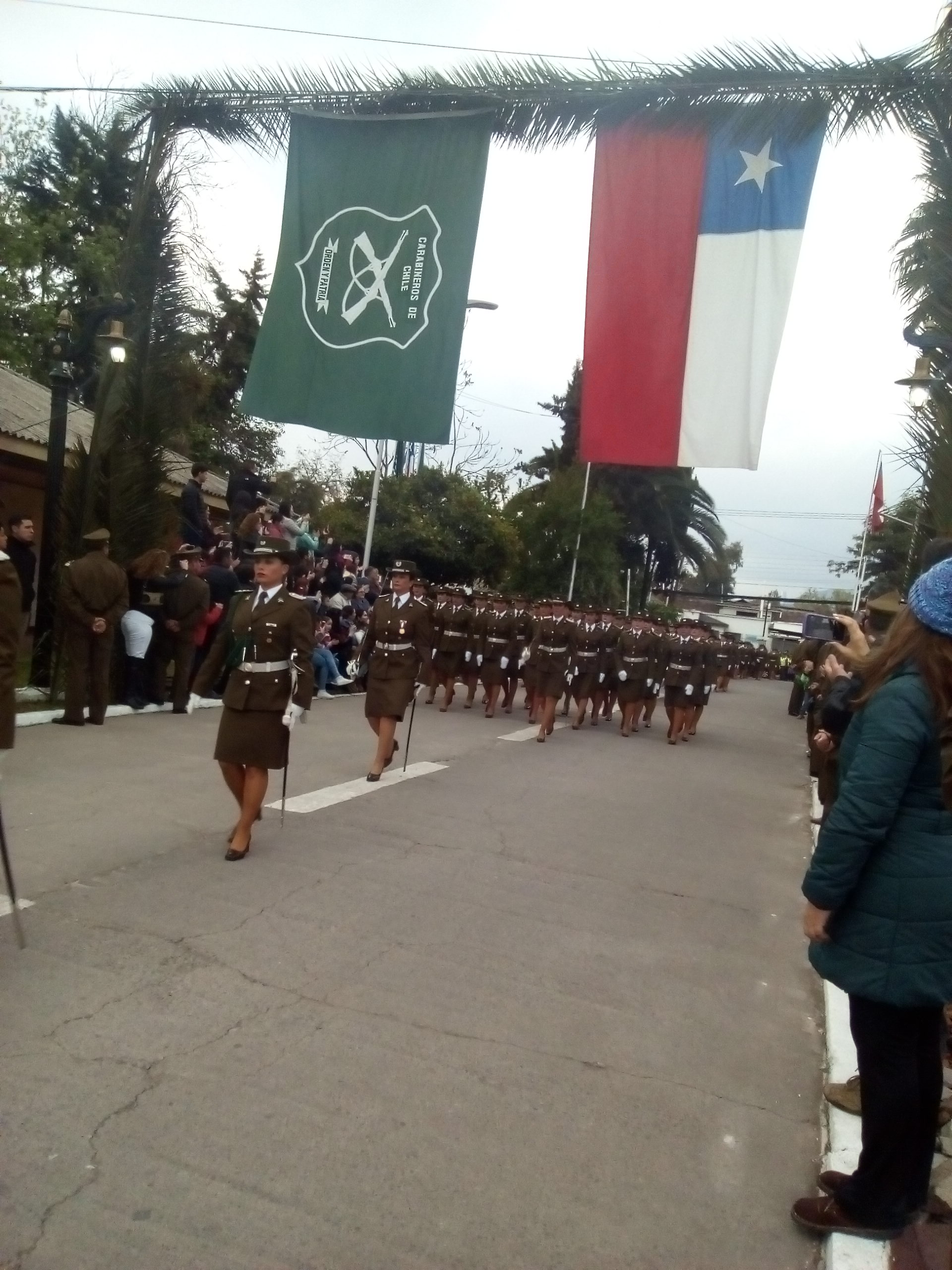 Desfile del 19 de Septiembre de 2017 en la Escuela Fabriciano González